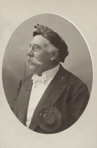 Astolf Mozart Möller.